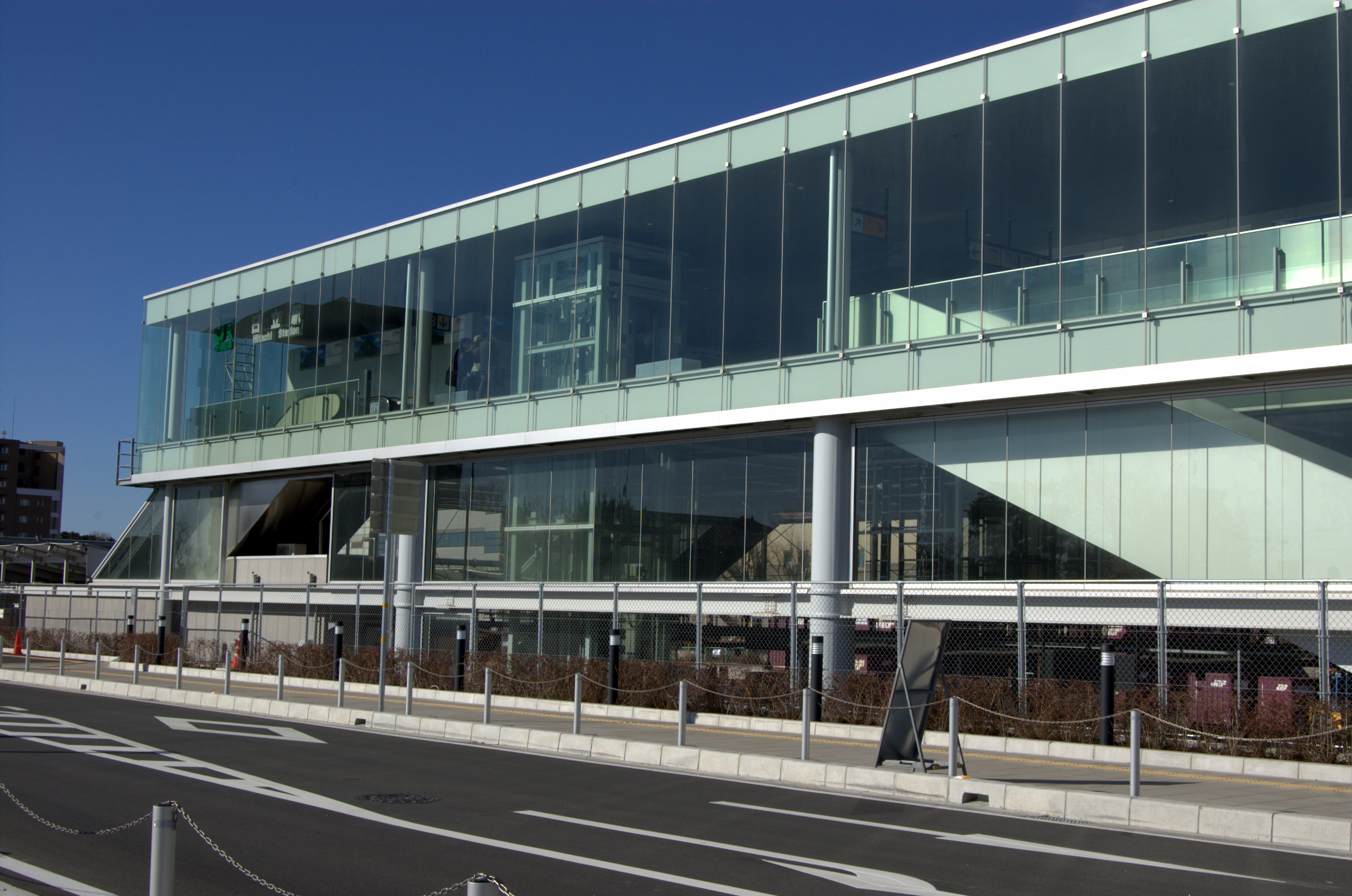 東日本旅客鉄道日立駅新駅舎